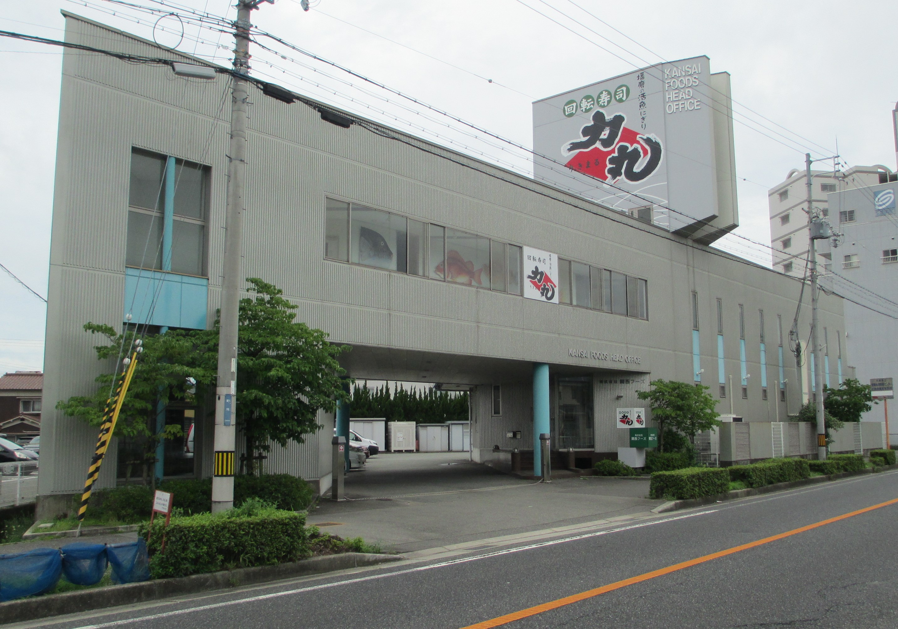 Kansaifoods Co., Ltd. 関西フーズ本社 所在地 〒670-0984 兵庫県姫路市町坪179-9 代表取締役 福永 力夫 創業 昭和55年3月 現法人設立 昭和62年10月 資本金 5千万円 従業員数 約270名 (正社員50名・パート・アルバイト含む) 店舗数 平成28年12月末現在 11店舗 事業内容 回転寿司のチェーン店